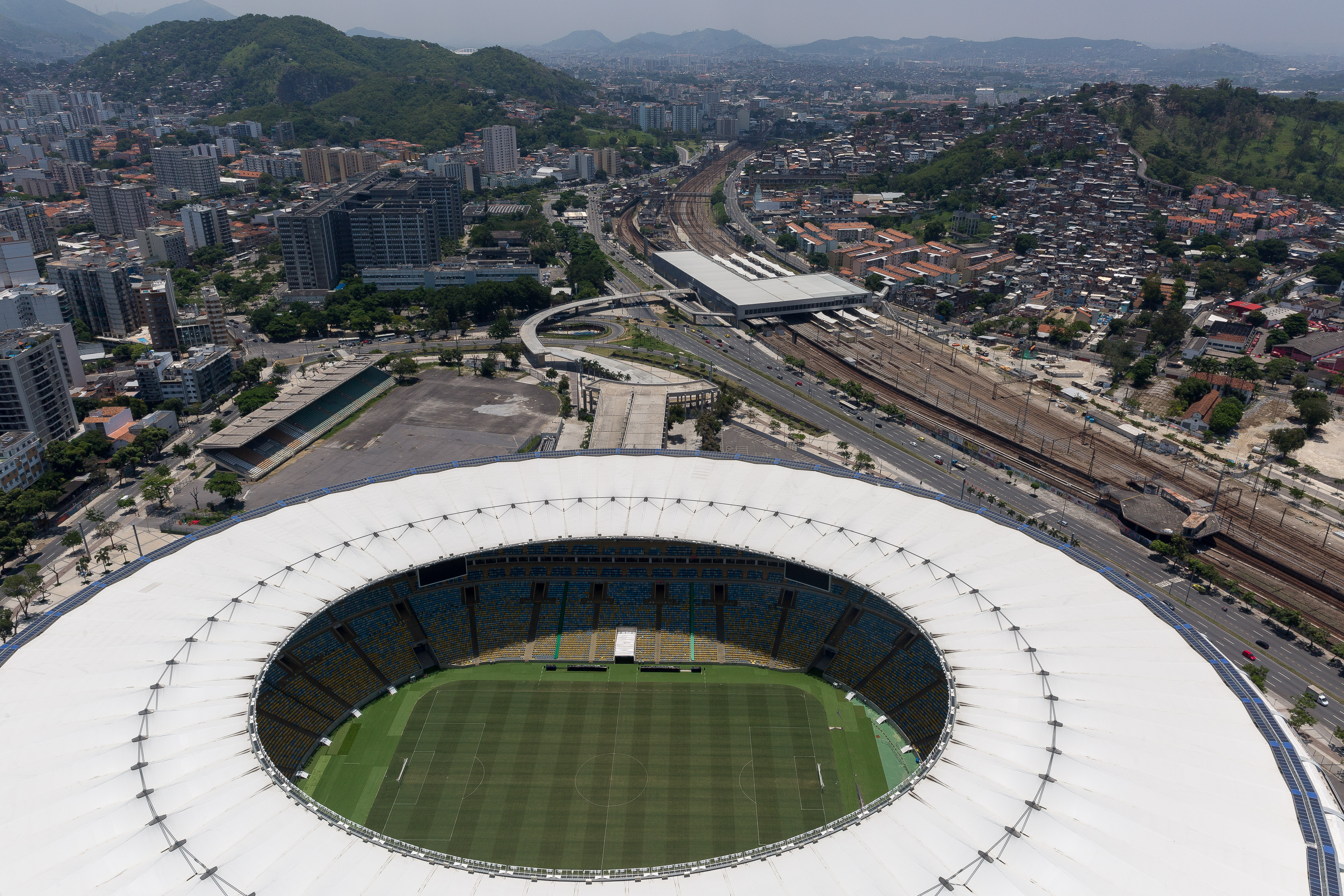 Vista aérea do estádio Maracanã, localizado na cidade do Rio de Janeiro.